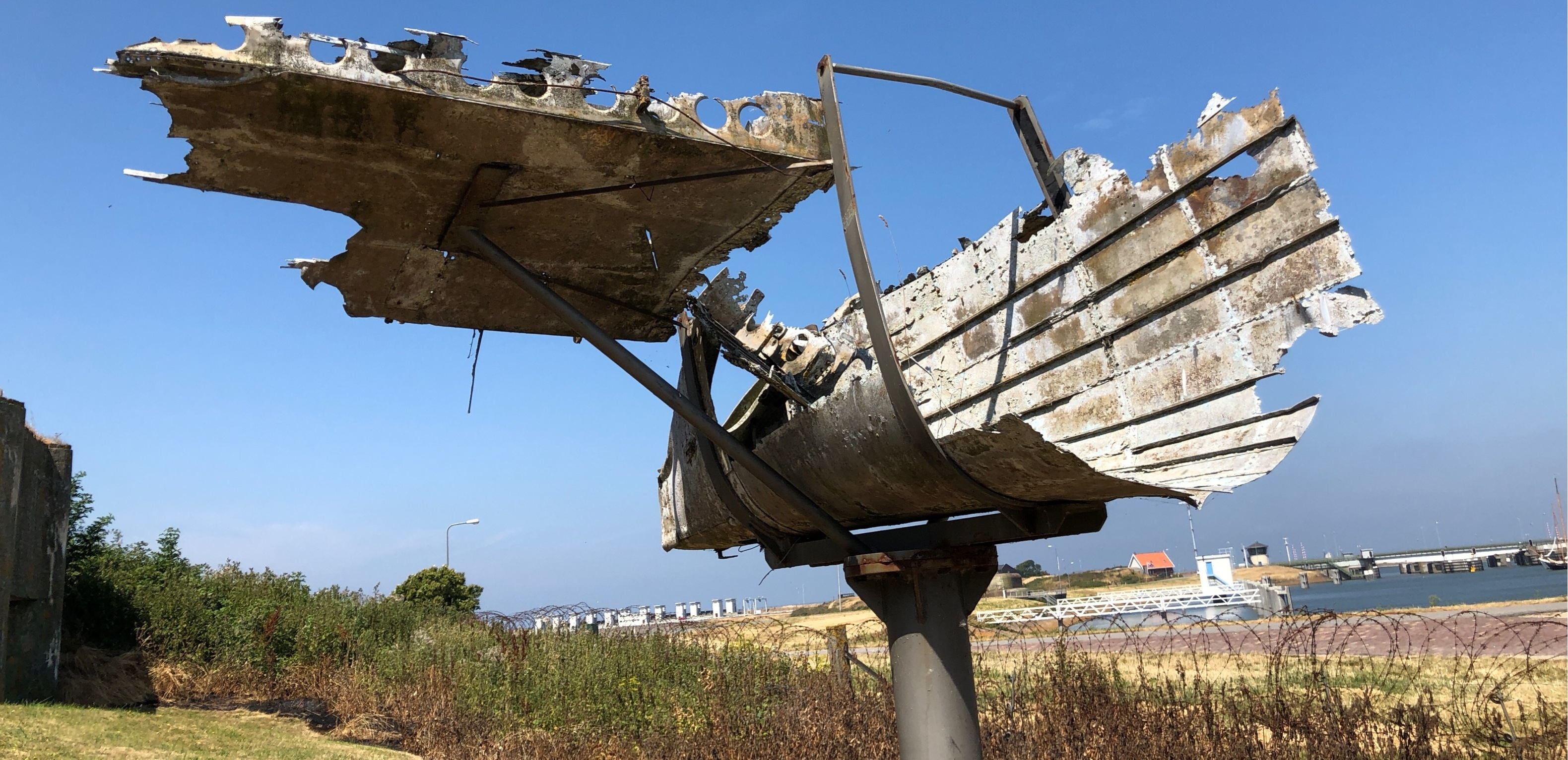 On Kornwerderzand this monument can be found. It is the tail of the Lockheed Hudson FK790 which crashed on 6 July 1944. One of the occupants in the aircraft was Jan Bockma, a Dutchman who voluntarily reported at the French Foreign Legion in 1942. Later he was a secret agent for the Dutch BBO (Bureau Special Assignments), a part of the SOE. For this office he made his last flight in this Hudson. They were on a secret sabotage mission and were shot down by a German Night fighter. All 8 occupants (incl. 4 crew) were killed in the crash. Aquarel by Dutch artist Dirk van Rijn In de nacht van 5 op 6 juli 1944 vertrok het vliegtuig vanaf vliegbasis Tempsford, bij Londen, naar Nederland. Aan boord waren 8 personen, 4 Engelse vliegers en 4 Nederlandse geheimagenten. De in Engeland opgeleide agenten zouden boven de Appelsche heide, bij Nijkerk GLD, uit het toestel springen en het verzet ondersteunen tegen de Duitsers. Boven de Waddenzee is het toestel mogelijk getroffen door een Duitse jager en 4 km ten westen van Kornwerderzand neergestort in het IJsselmeer. Alle 8 inzittenden zijn omgekomen en 7 lichamen zijn indertijd drijvend aangetroffen. In 1997 zijn de overblijfselen van de gezagvoerder uit de wrakstukken geborgen. Aquarel van de Nederlandse kunstenaar Dirk van Rijn